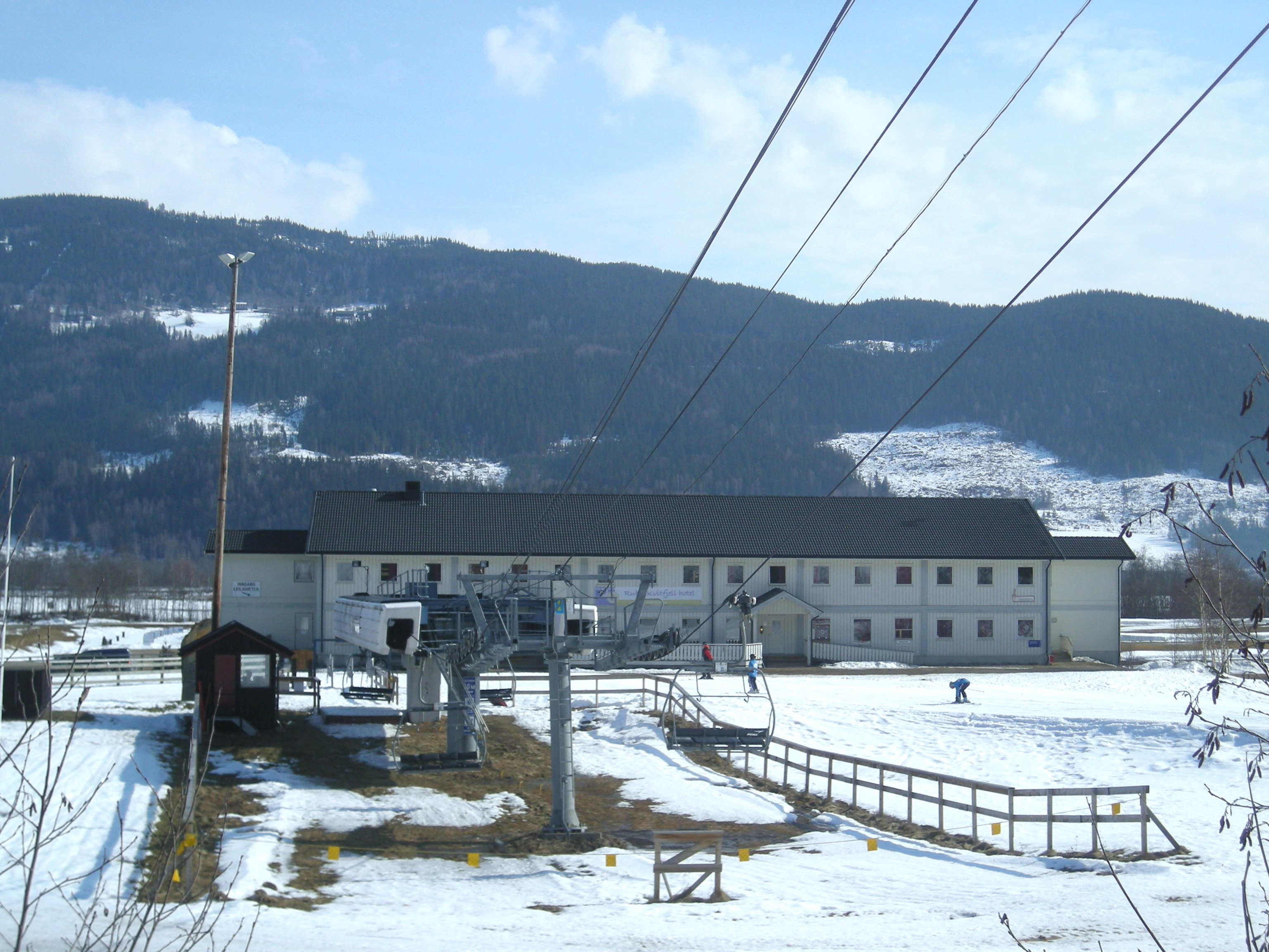 Skitrekket på Kvitfjell begynner nedenfor jernbanelinjen.